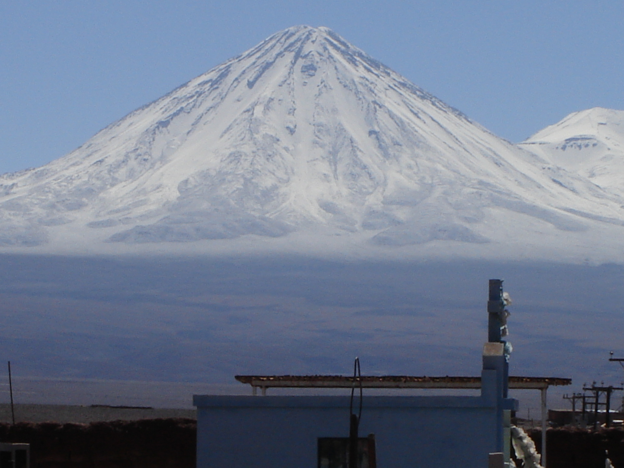 Licancabur Volcano in San Pedro de Atacama, Chile.